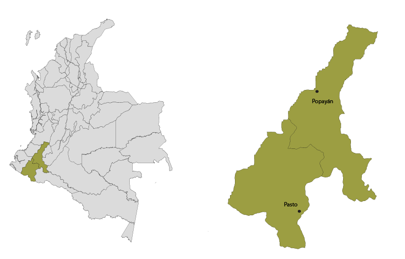 Eje musical Andino Sur-occidental